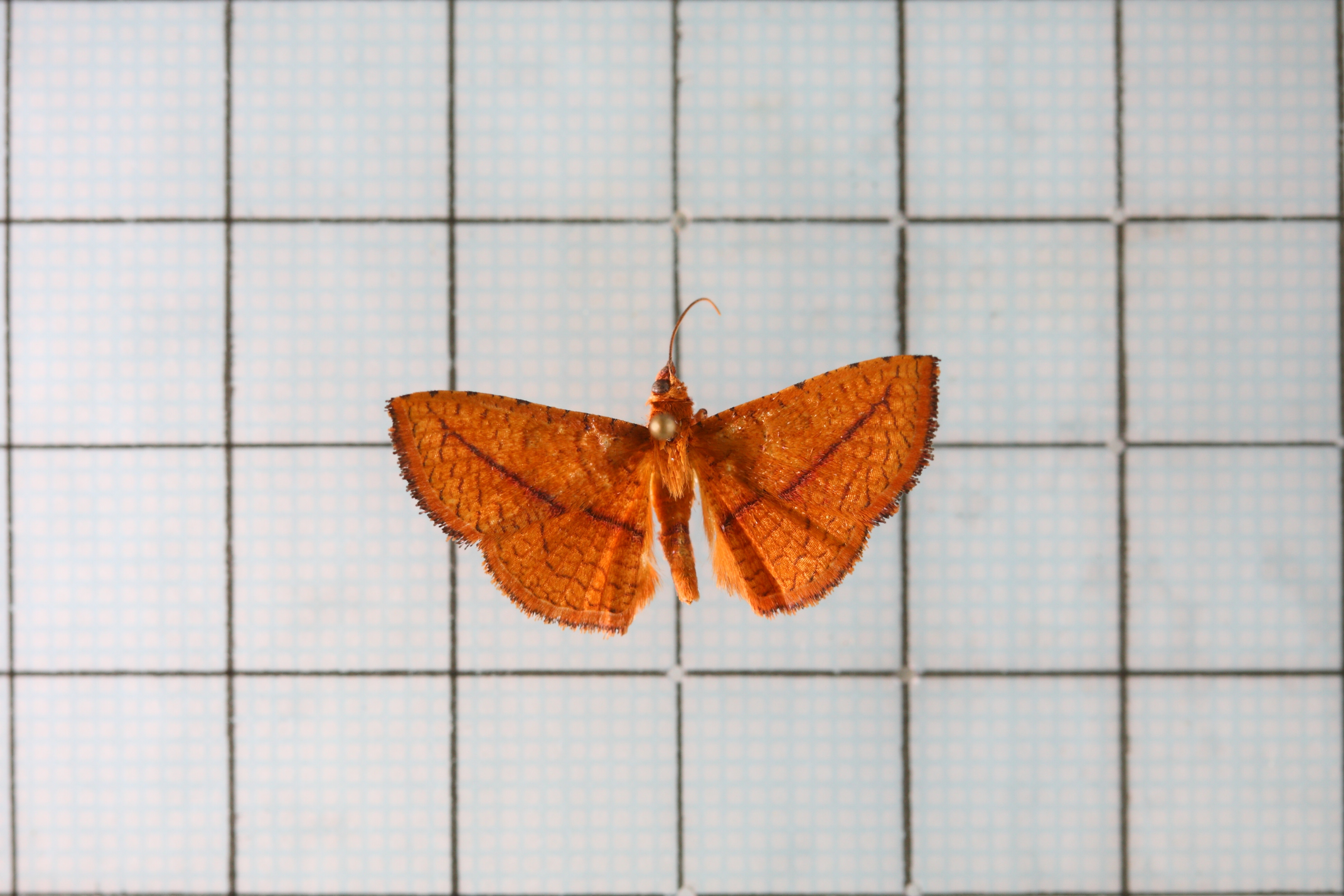 Striglina scitaria (Walker, 1862) 斜線窗蛾 認識台灣的昆蟲 20 :P.223